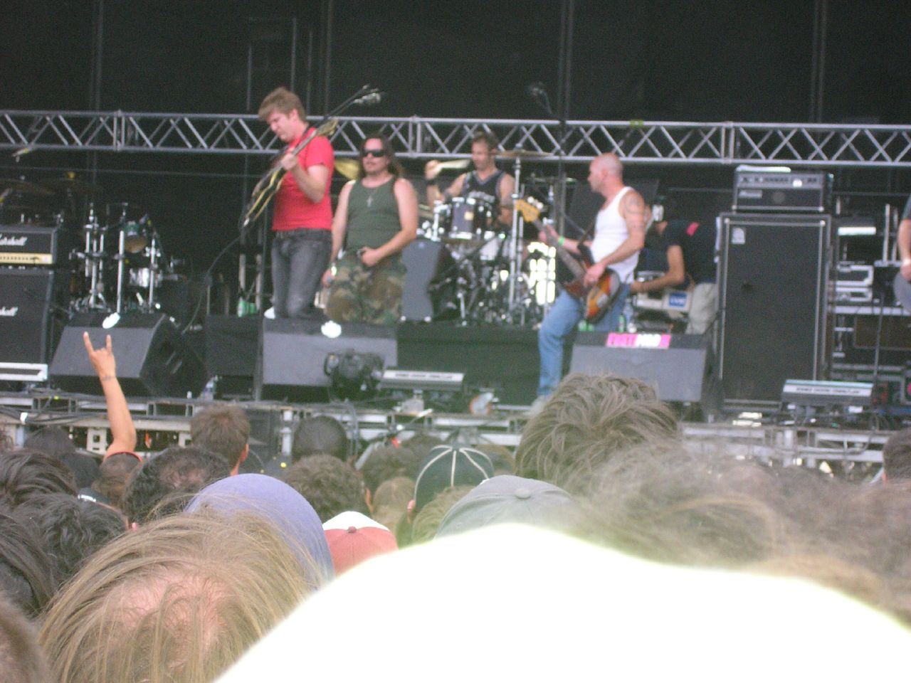 El grupo Hermano en uno de los dos escenarios principales de Festimad 2005, el escenario Heineken.